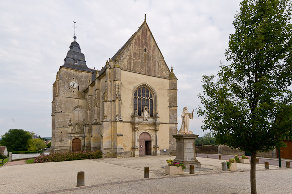 Eglise d'Alménèches (Abbatiale)